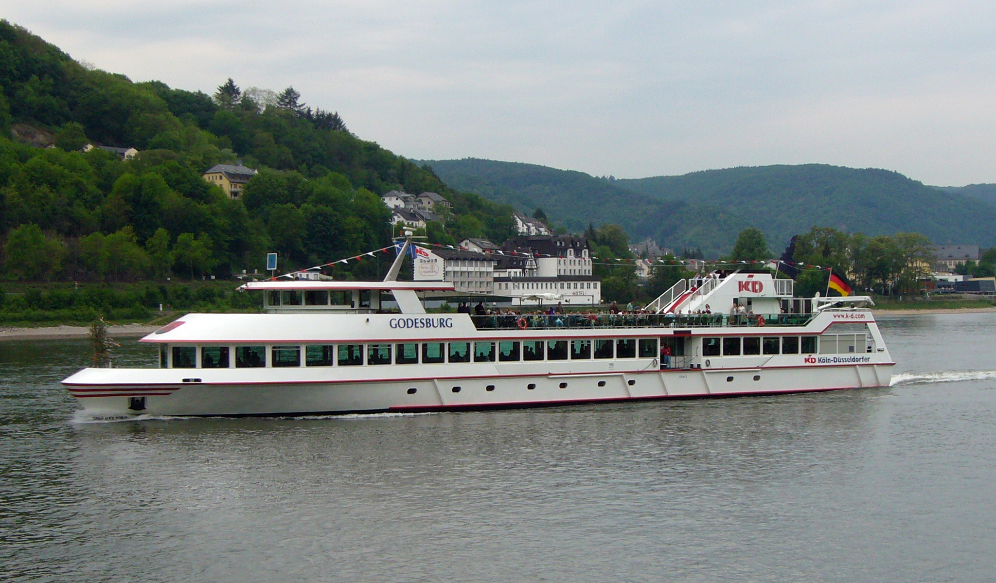 MS Godesburg